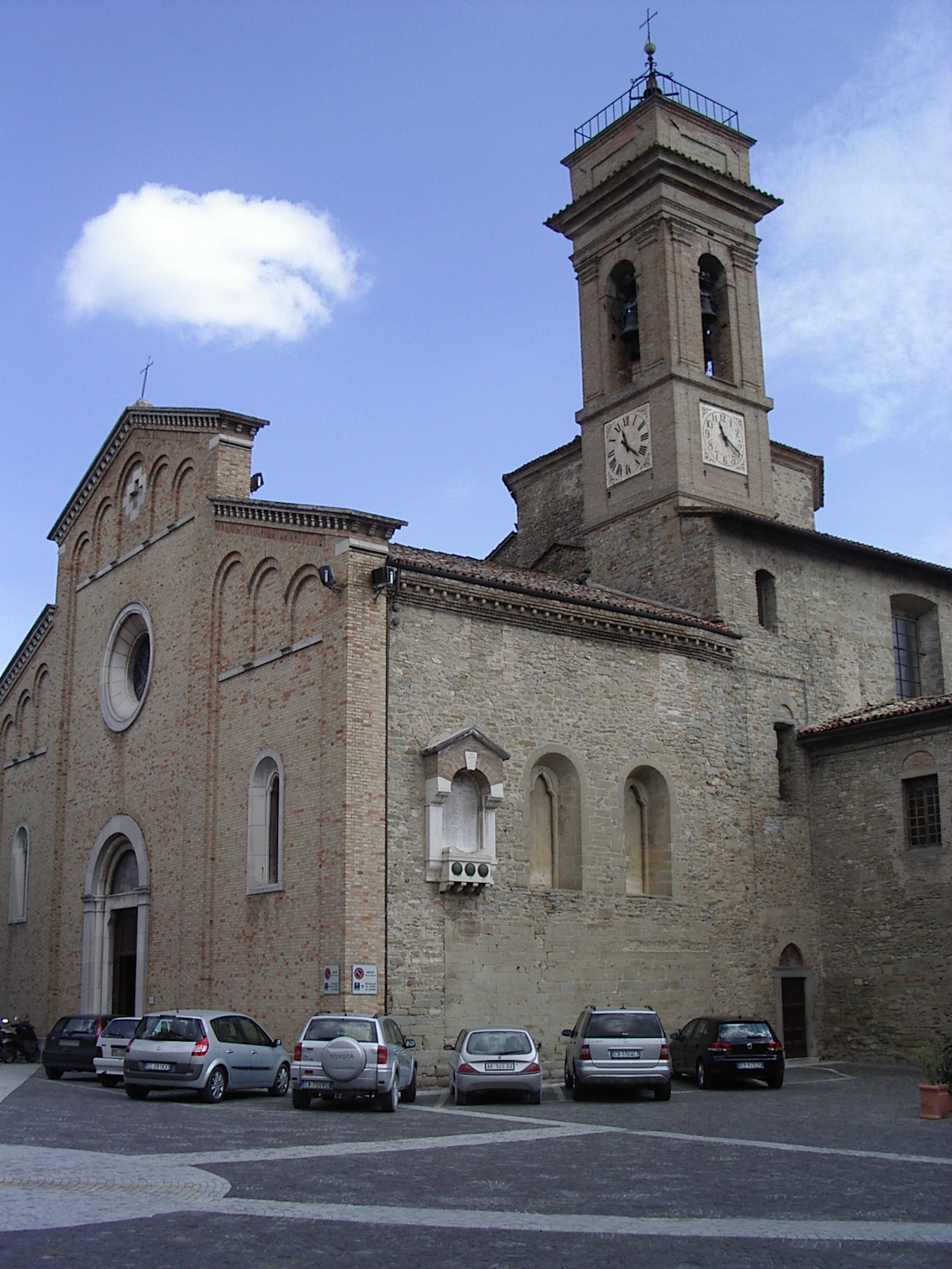 Pieve Collegiata Mercatello sul Metauro Marches Italy